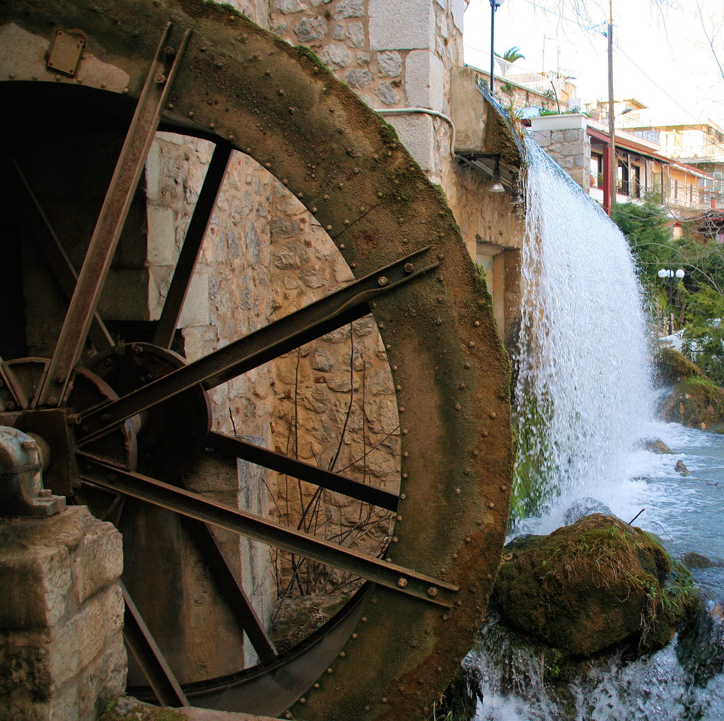 Lvadia2